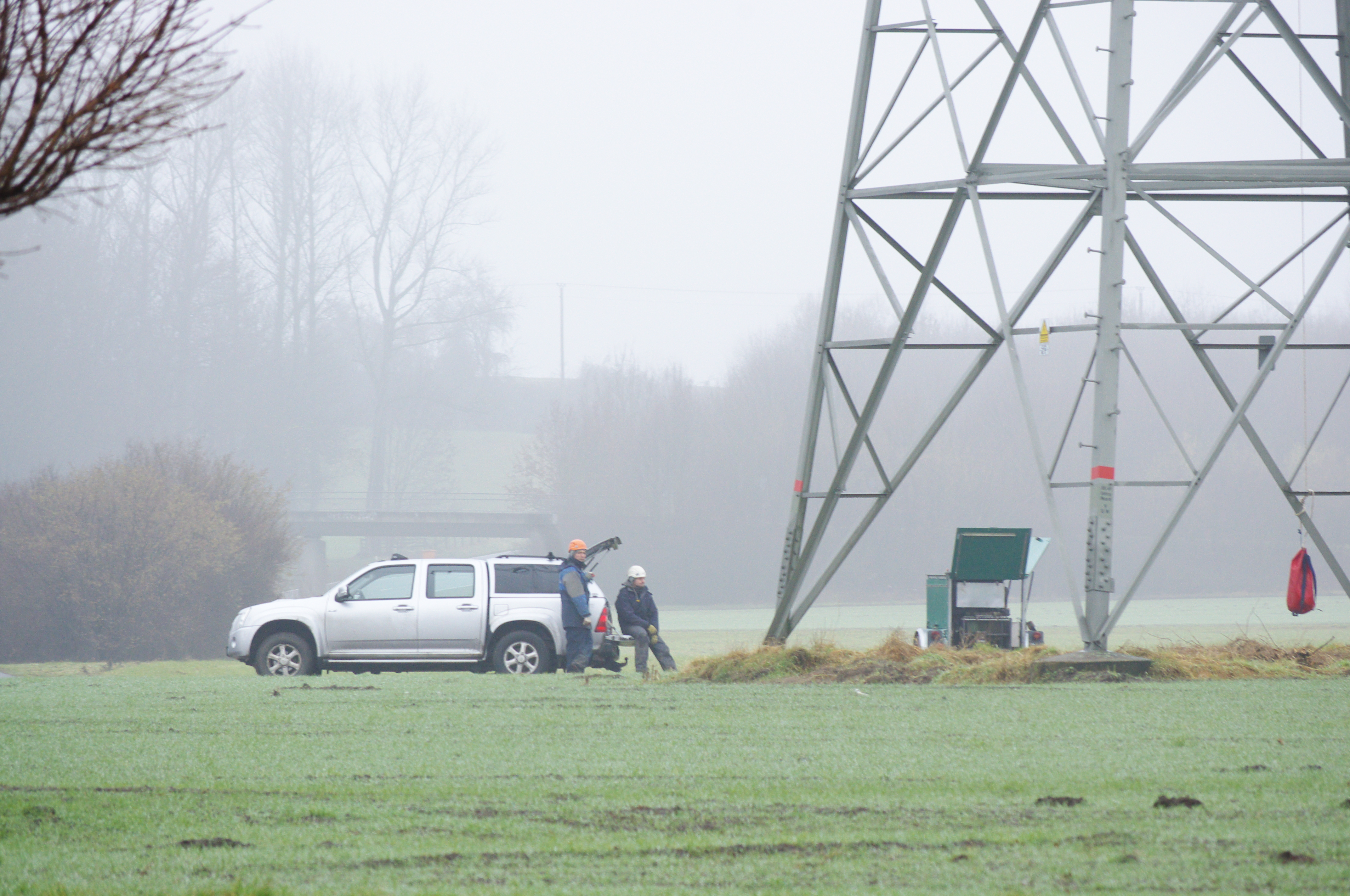 Freileitungswartung